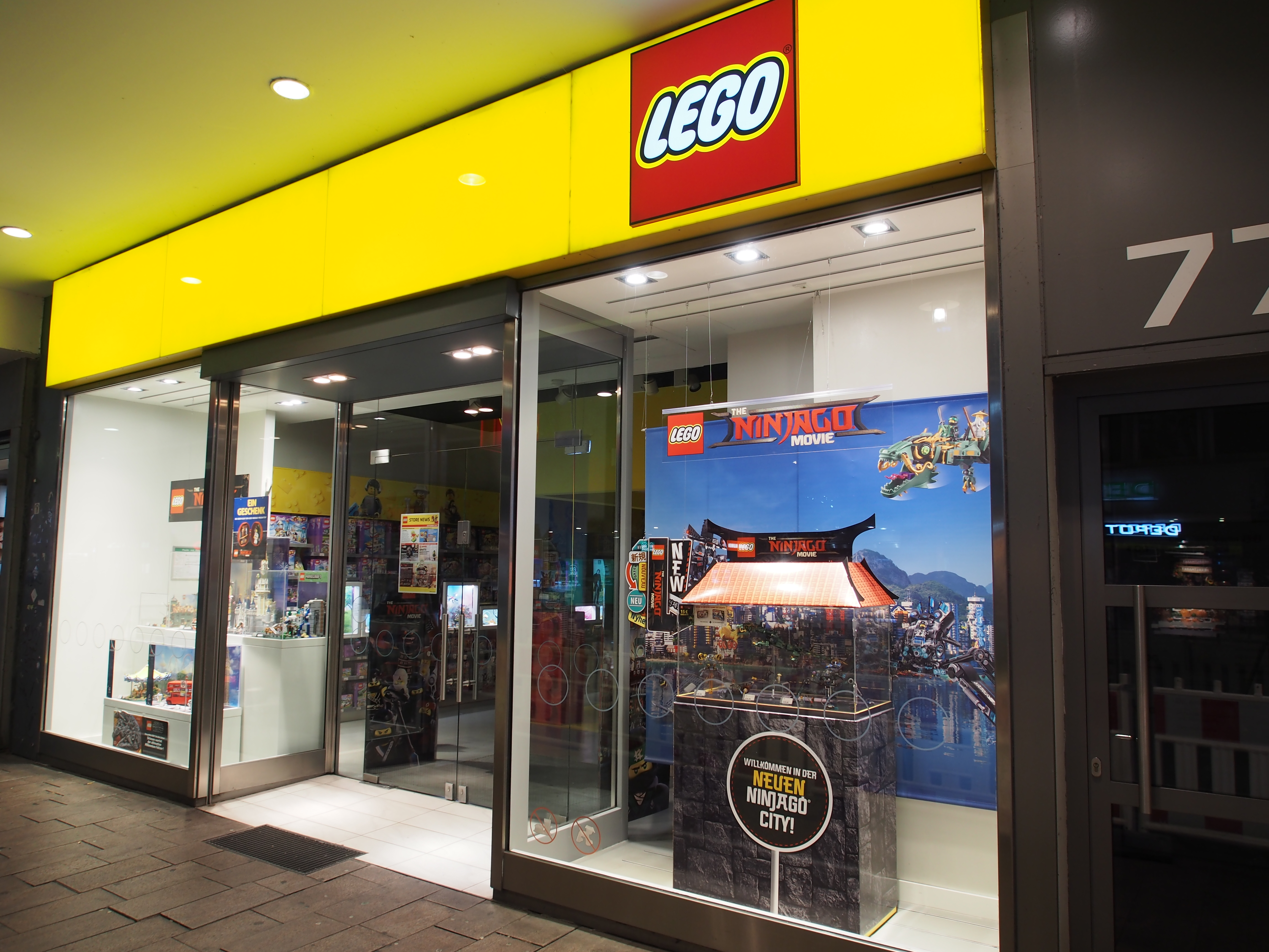 Photographed in Saarbrücken, Germany